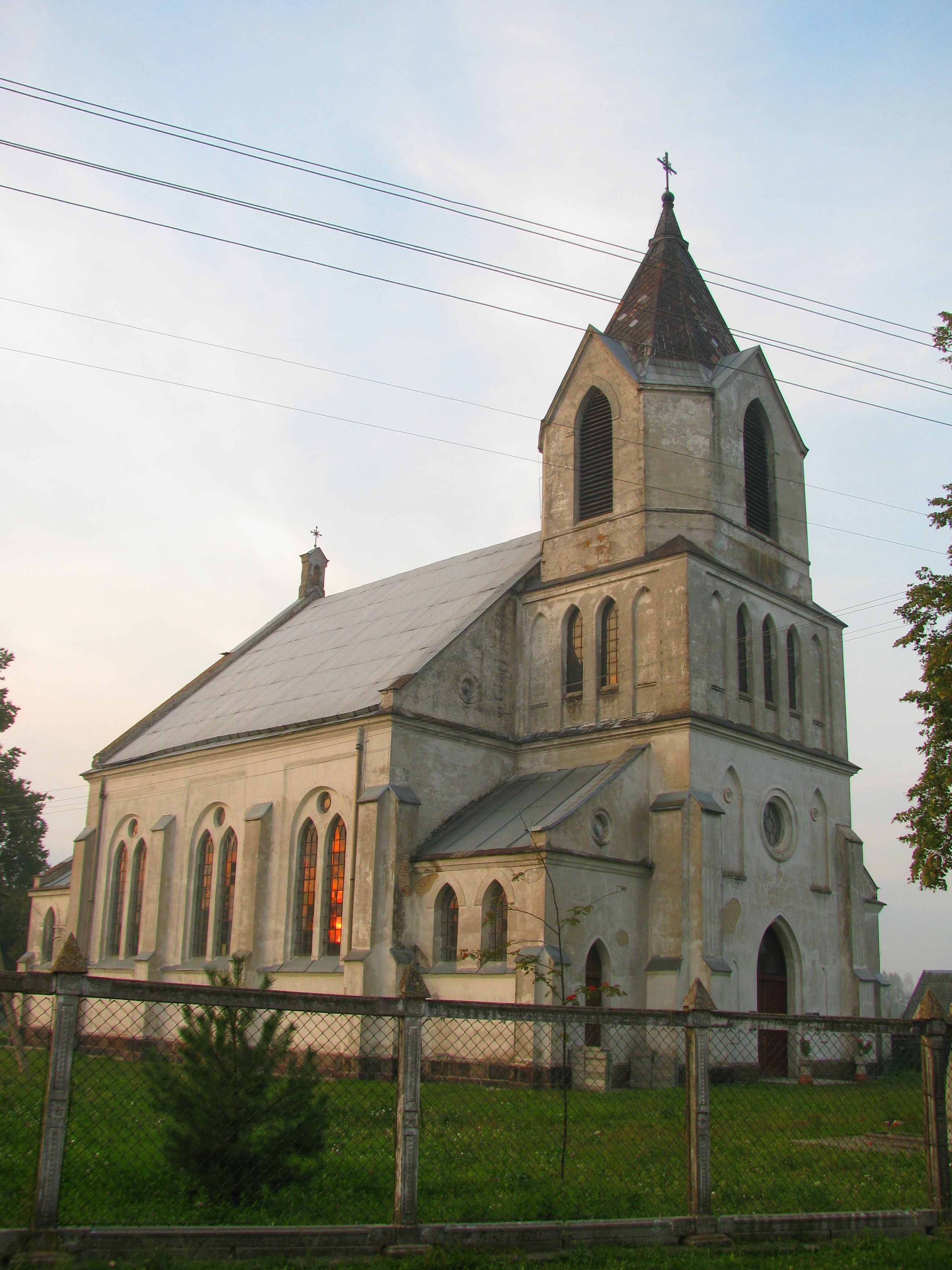 Беларуская (тарашкевіца): Касьцёл Сьвятога Аляксея. в. Сялец This is a photo of Belarusian heritage monument. Reference number: 113Г000155 ( WLM)